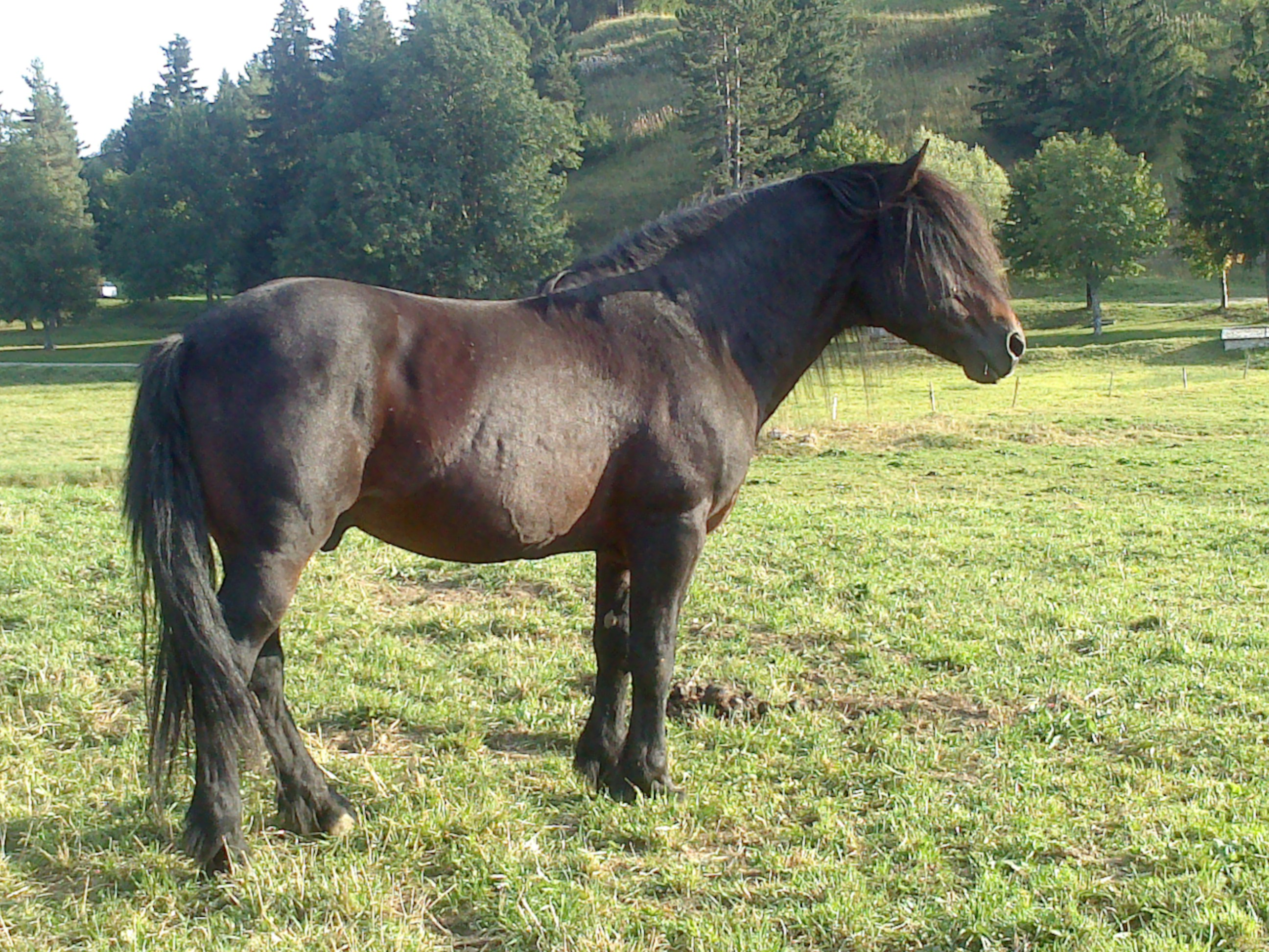 Cheval Barraquand à Autrans (Isère, Rhône-Alpes, France)